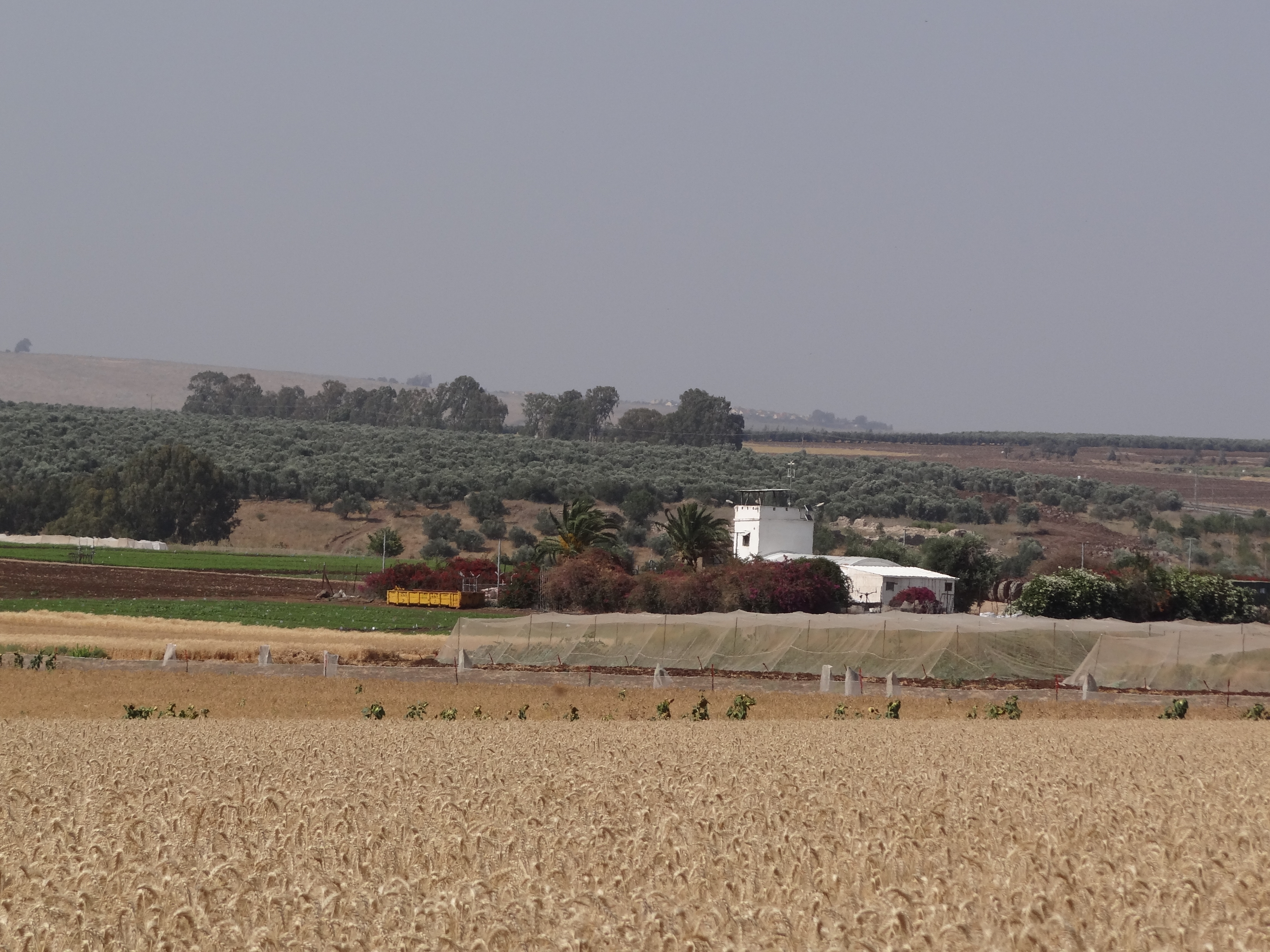 בית קשת הישנה - בית הביטחון ששרד הוא אתר מורשת. מקומה של בית קשת הישנה היה ממזרח לגבעה עליה יושב קיבוץ בית קשת היום תצפית על האתר מכיוון מערב